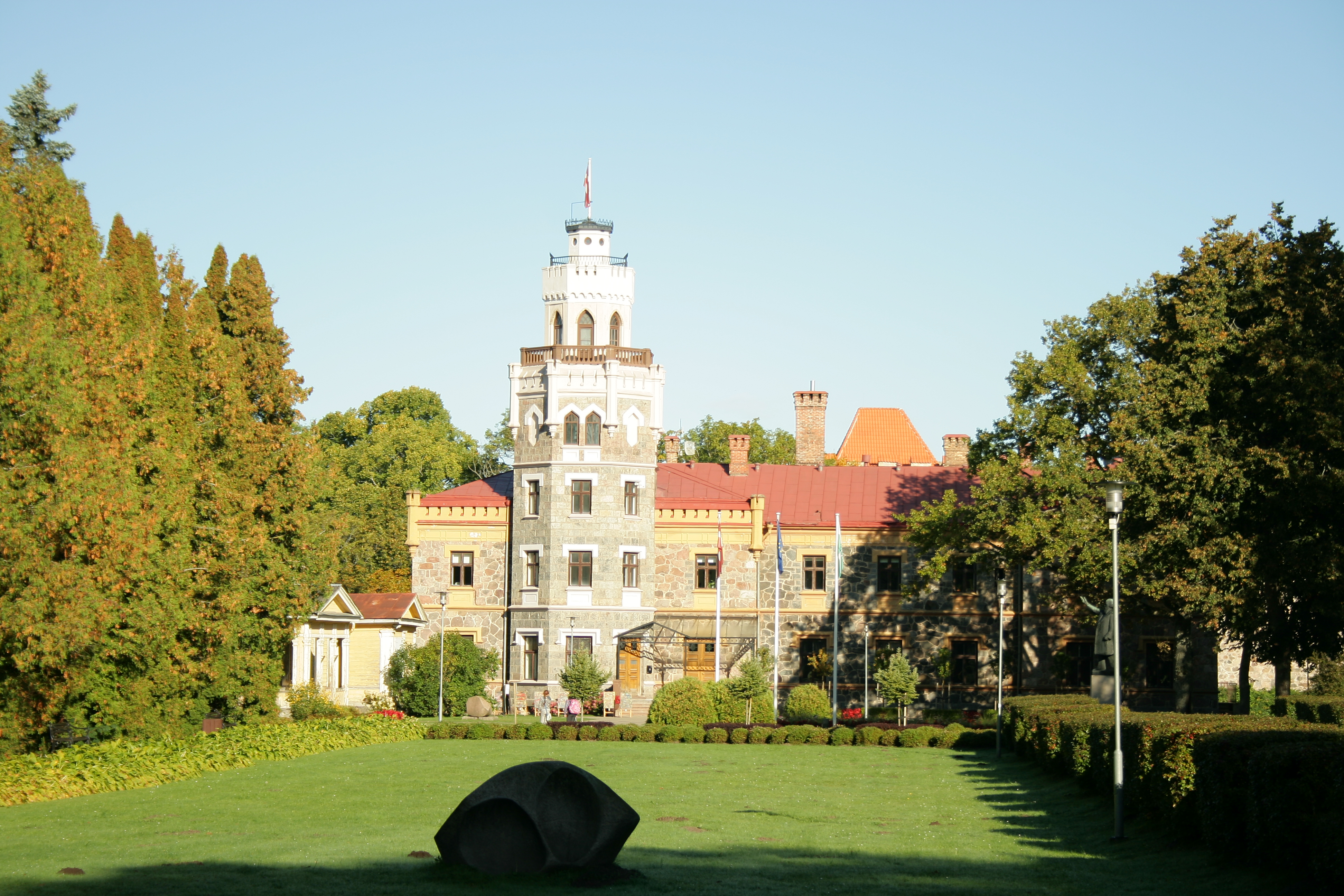 Jaunā pils, Sigulda, Pils iela 16